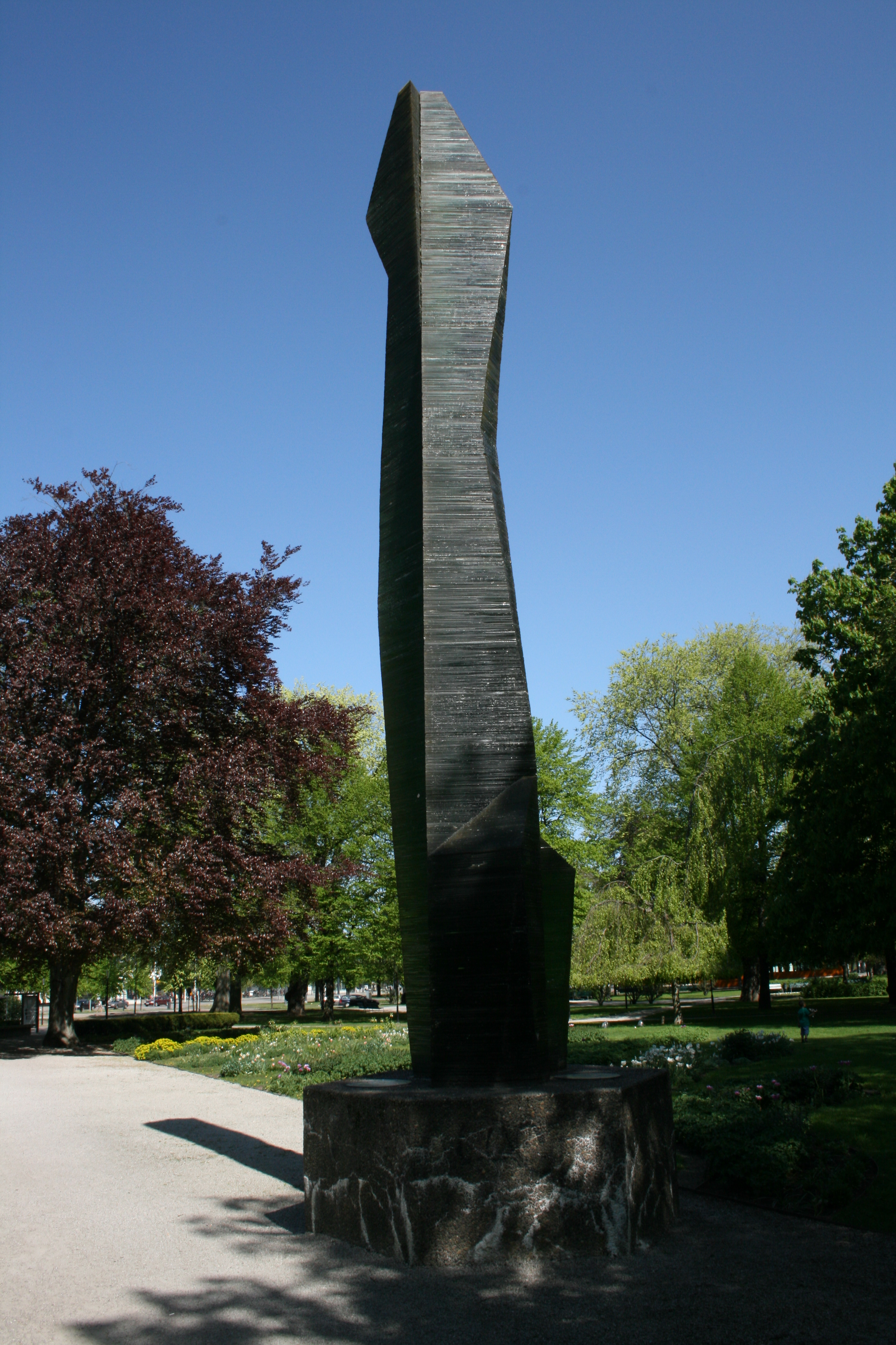 Prisma, konstverk på Olof Palmes plats i Norrköping